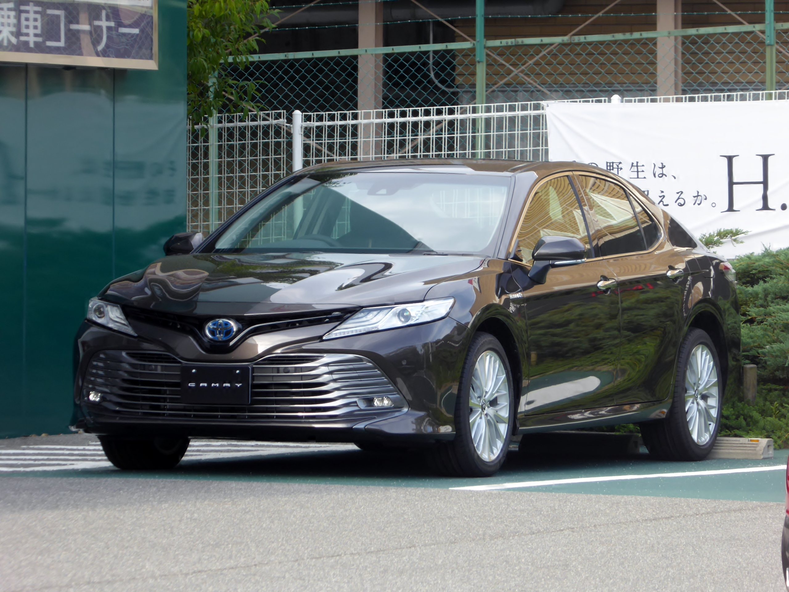 DAA-AXVH70-AEXNB型トヨタ・カムリG"レザーパッケージ"をフロントから撮影。